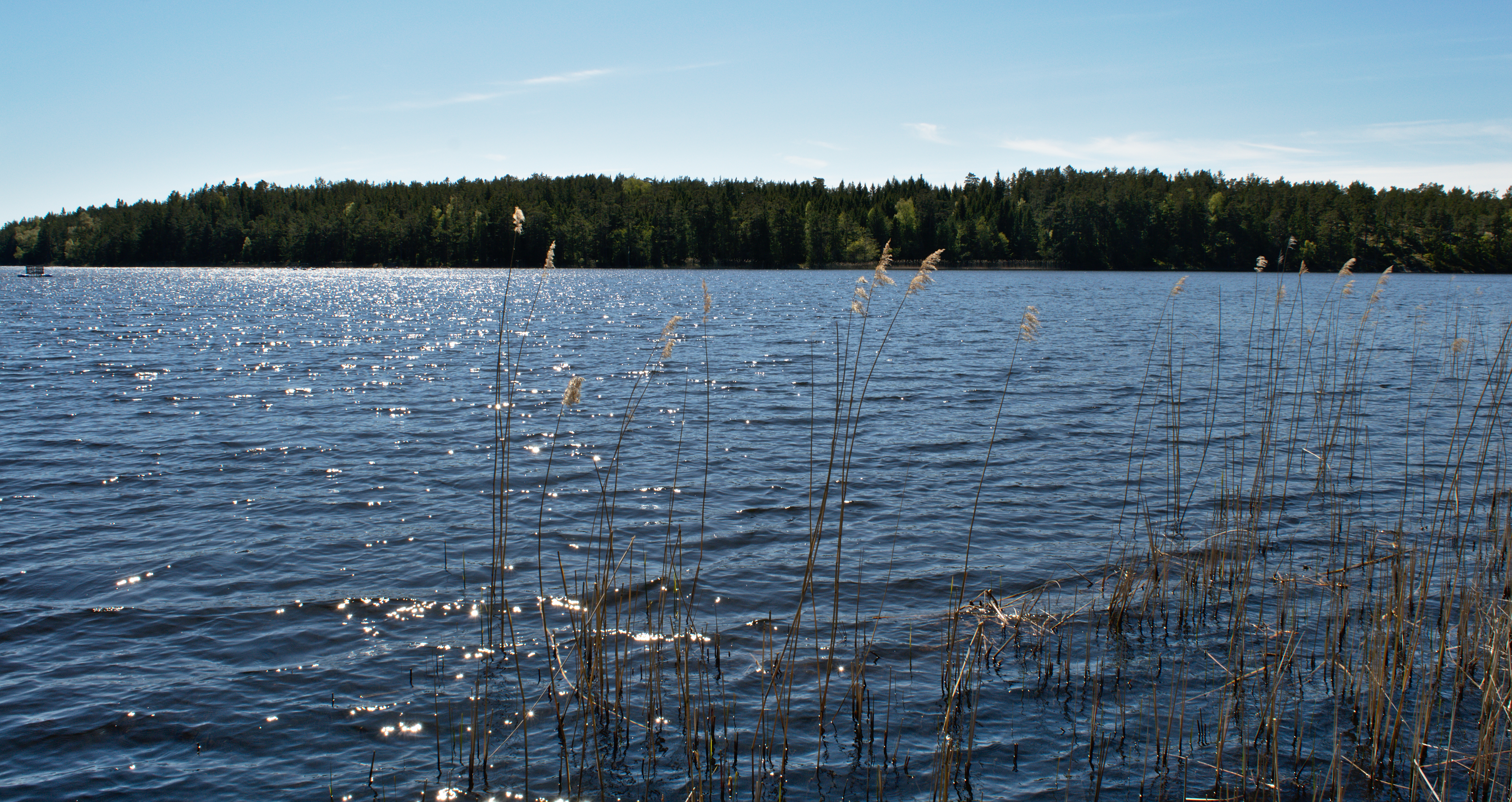 Sjön Långträsk på Ornö i Haninge kommun. Vy från norr.